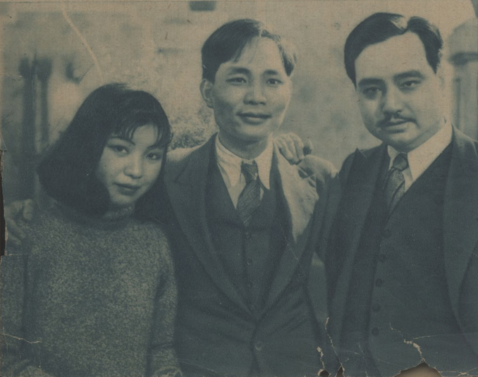 “自由神”導演司徒慧敏居中，曁主演者：王螢、周伯勳 《电通》 1935 第1期